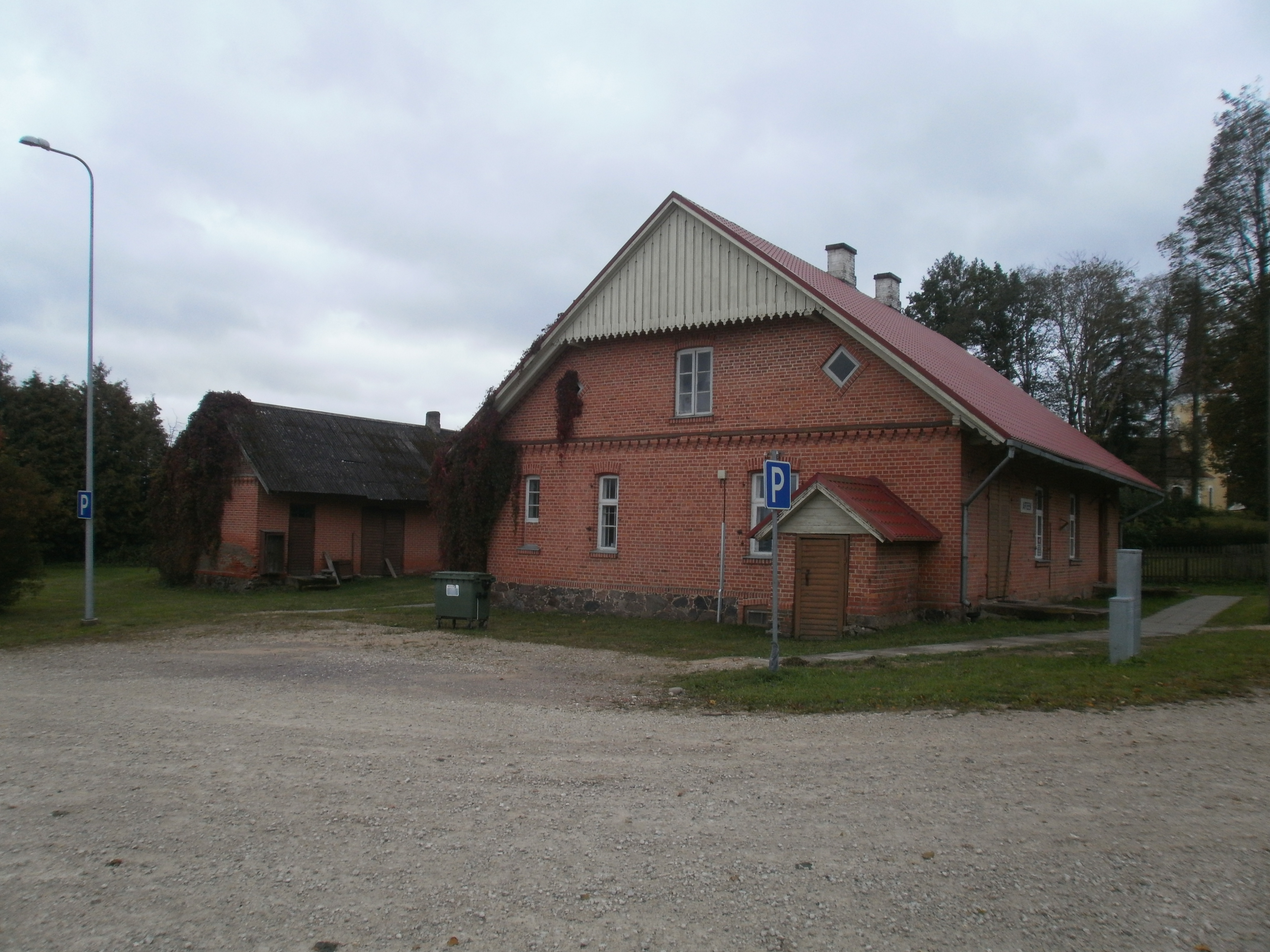 Tagumine väiksem on apteegi abihoone.